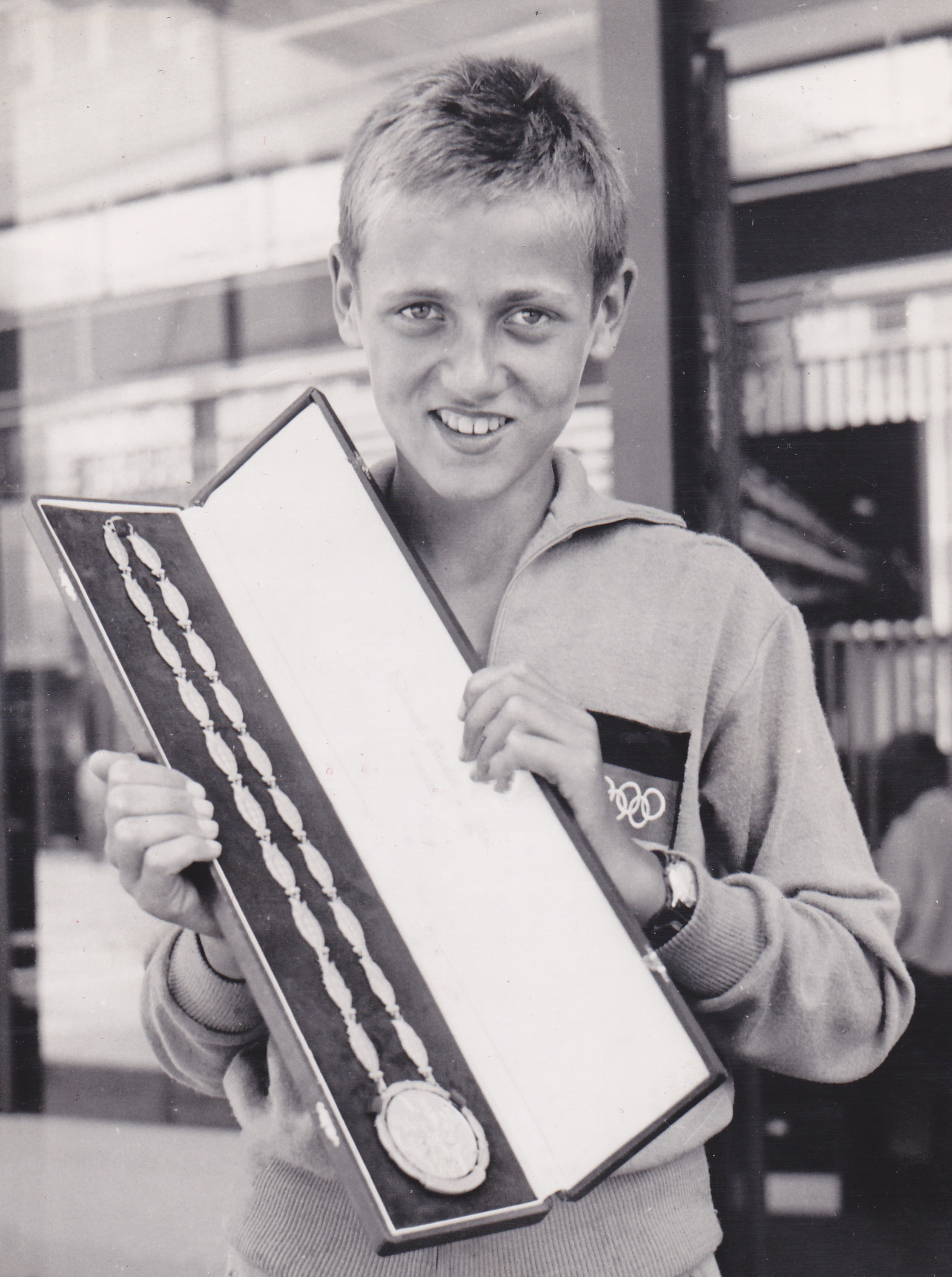 Klaus Zerta, 1960 Olympics